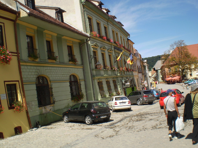 Cetatea Medievală sighişoara, Fosta Primărie Sighişoara, actualul hotel Sighişoara.